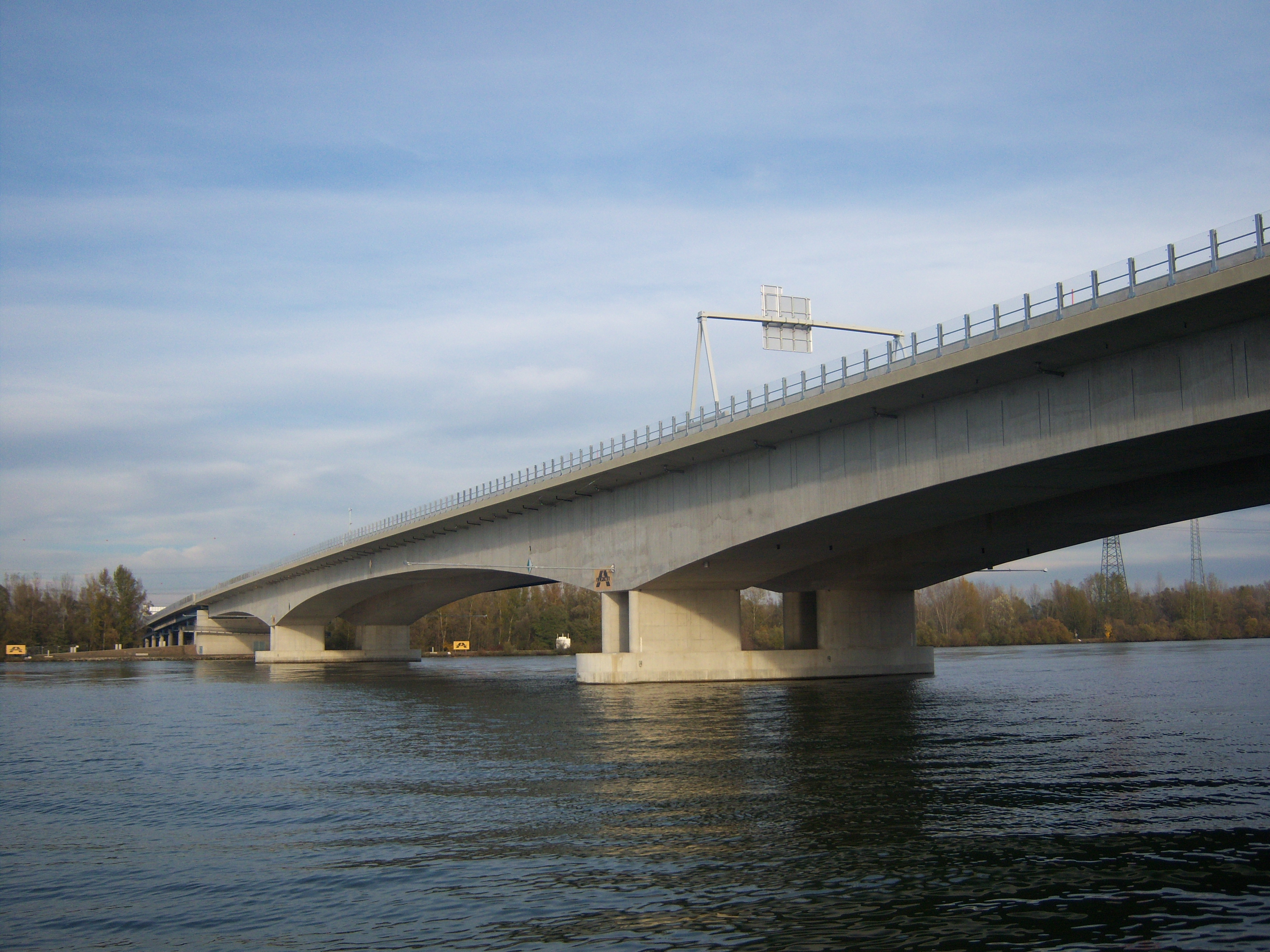 Blick vom südlichen Donauufer auf die Donaubrücke Traismauer Stromabwärts